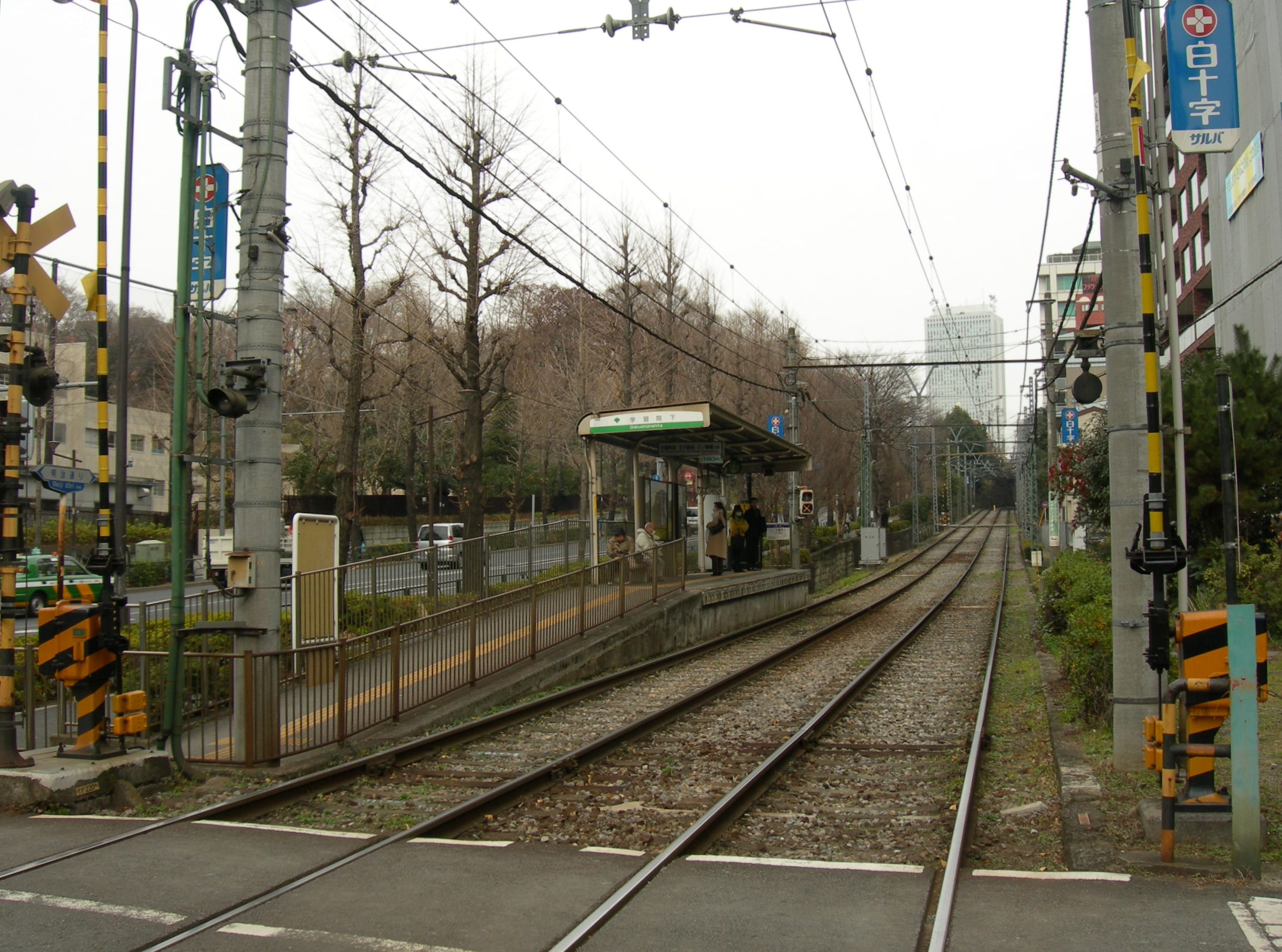 学習院下駅